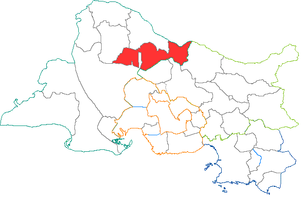 Situation du canton dans le département des Bouches-du-Rhône (France)